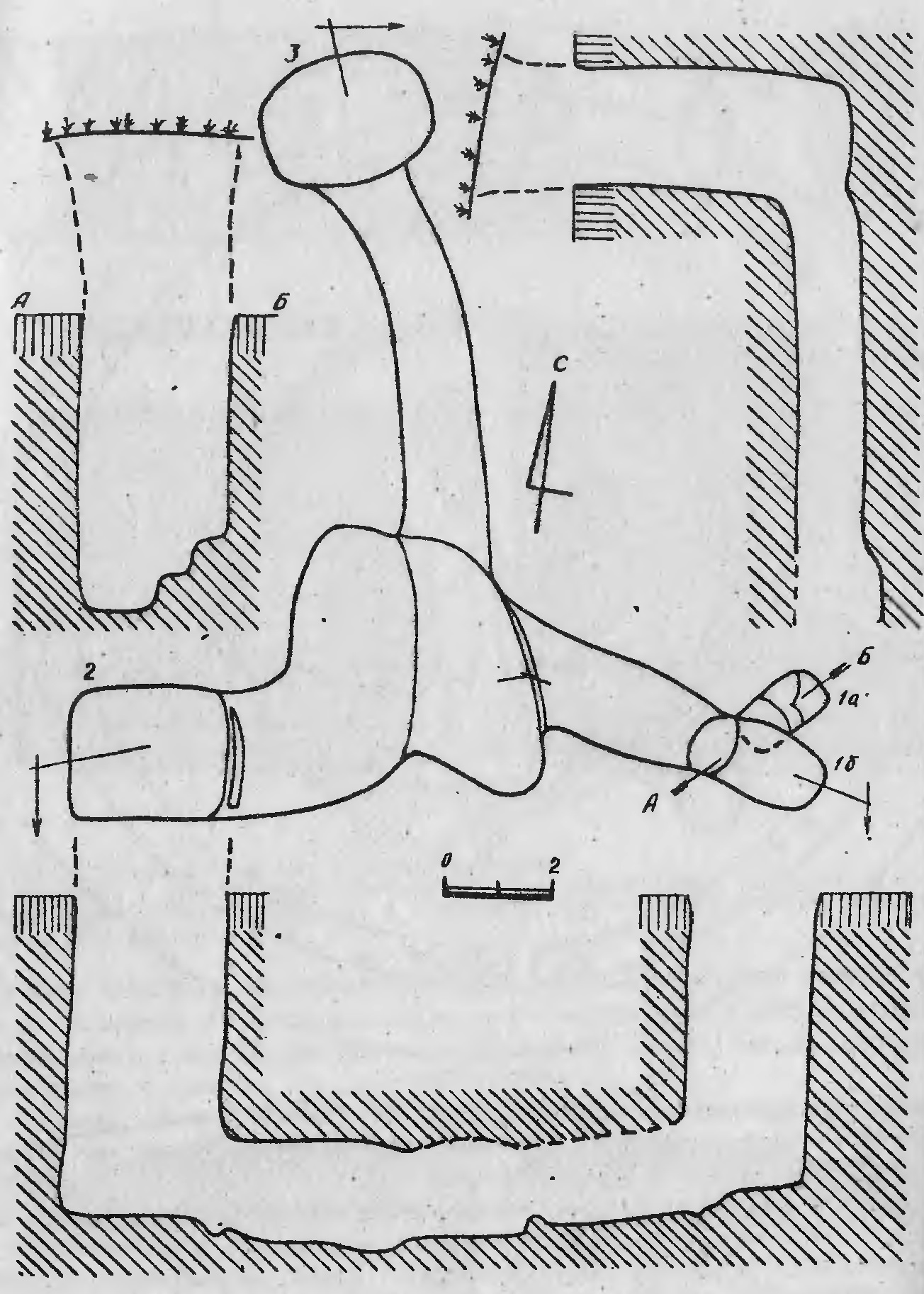 Розріз